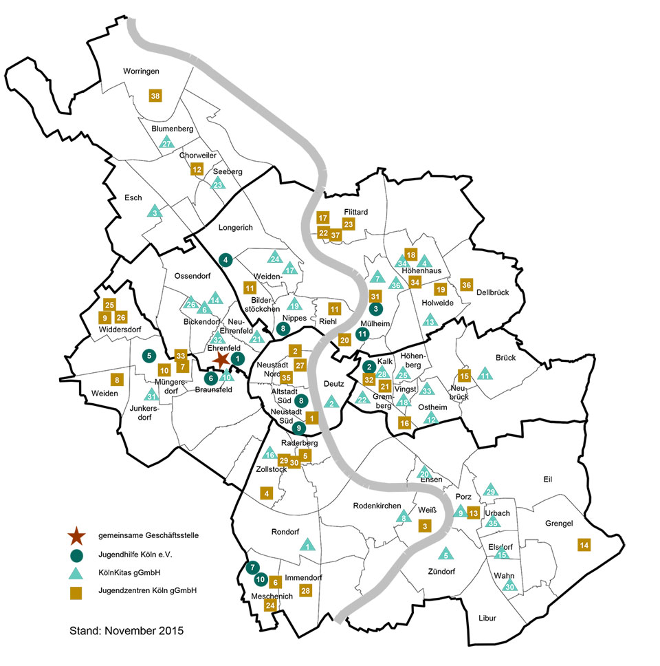 Trägernetzwerk JHK-KK-JugZ